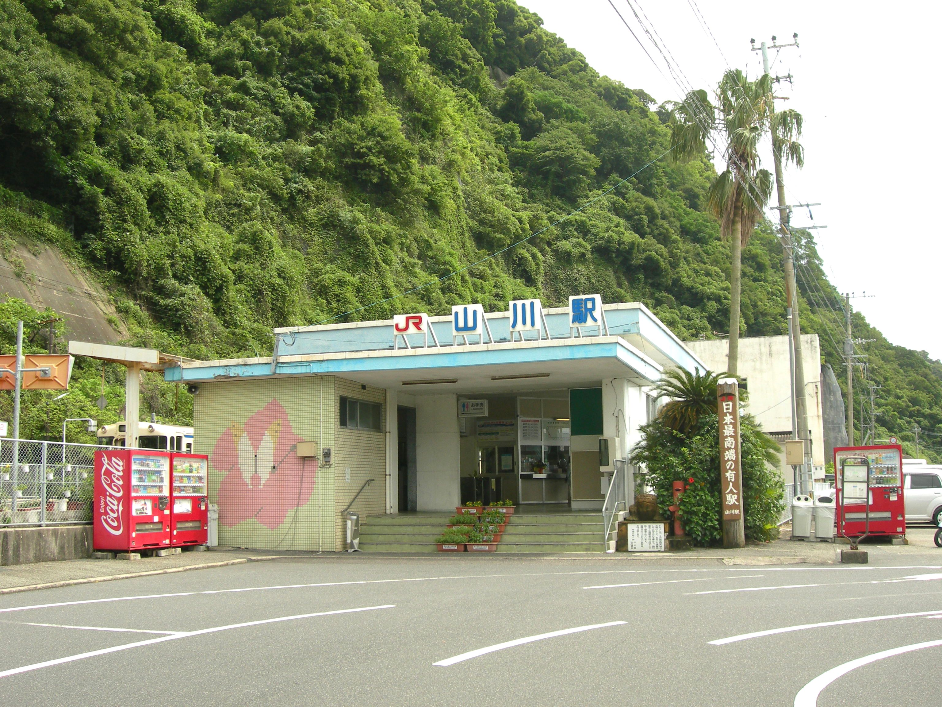 山川駅（やまかわえき）